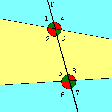 三线八角，内错角，外错角，同位角